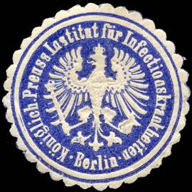 Sealing stamp Title: Königlich Preussisches Institut für Infectionskrankheiten - Berlin Description: blau, weiß, geprägt Place: Berlin size: 4 cm